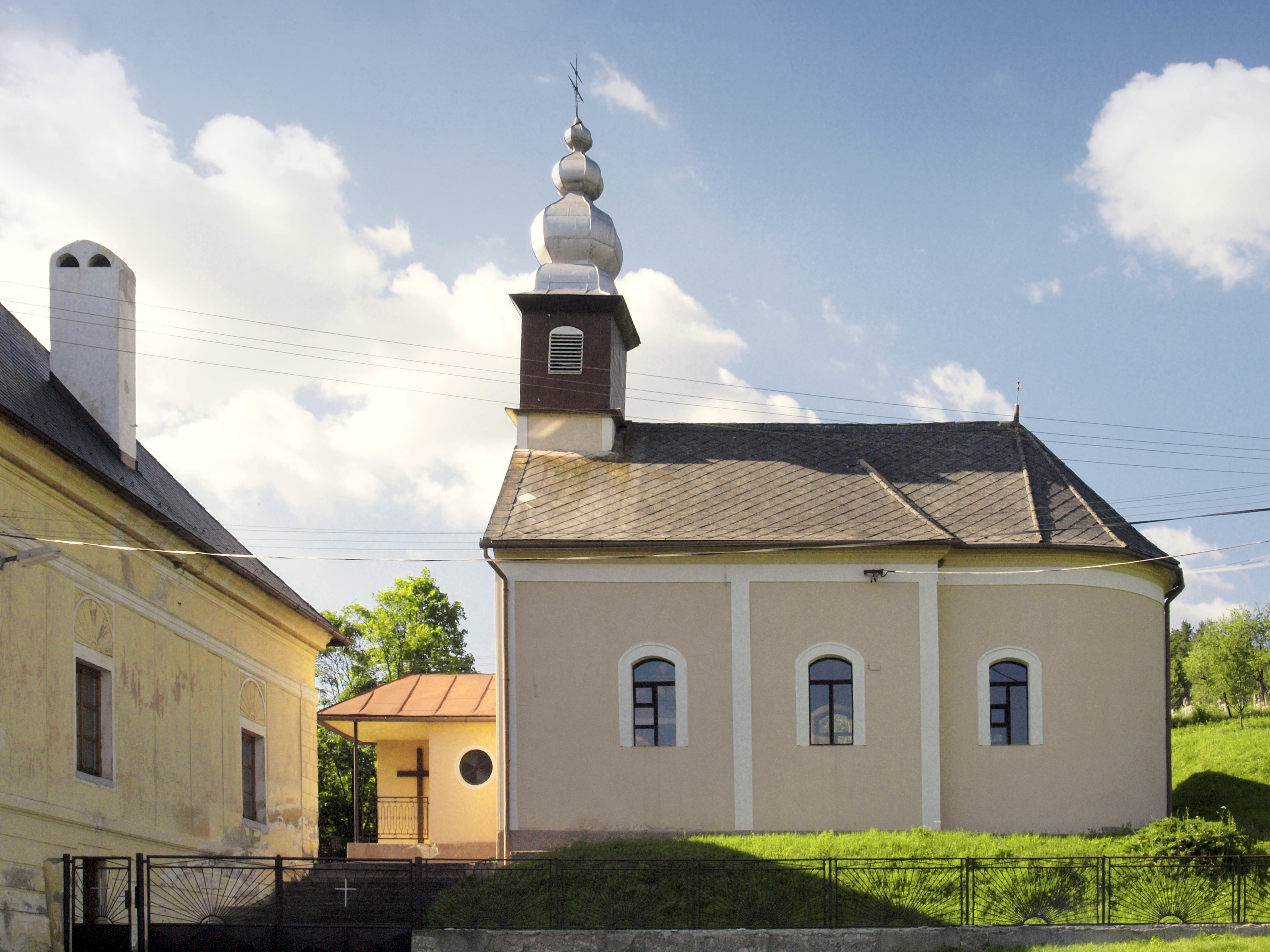 Žipov (Slovakia) - L'église Sainte-Anne (Kostol Sv Anny)